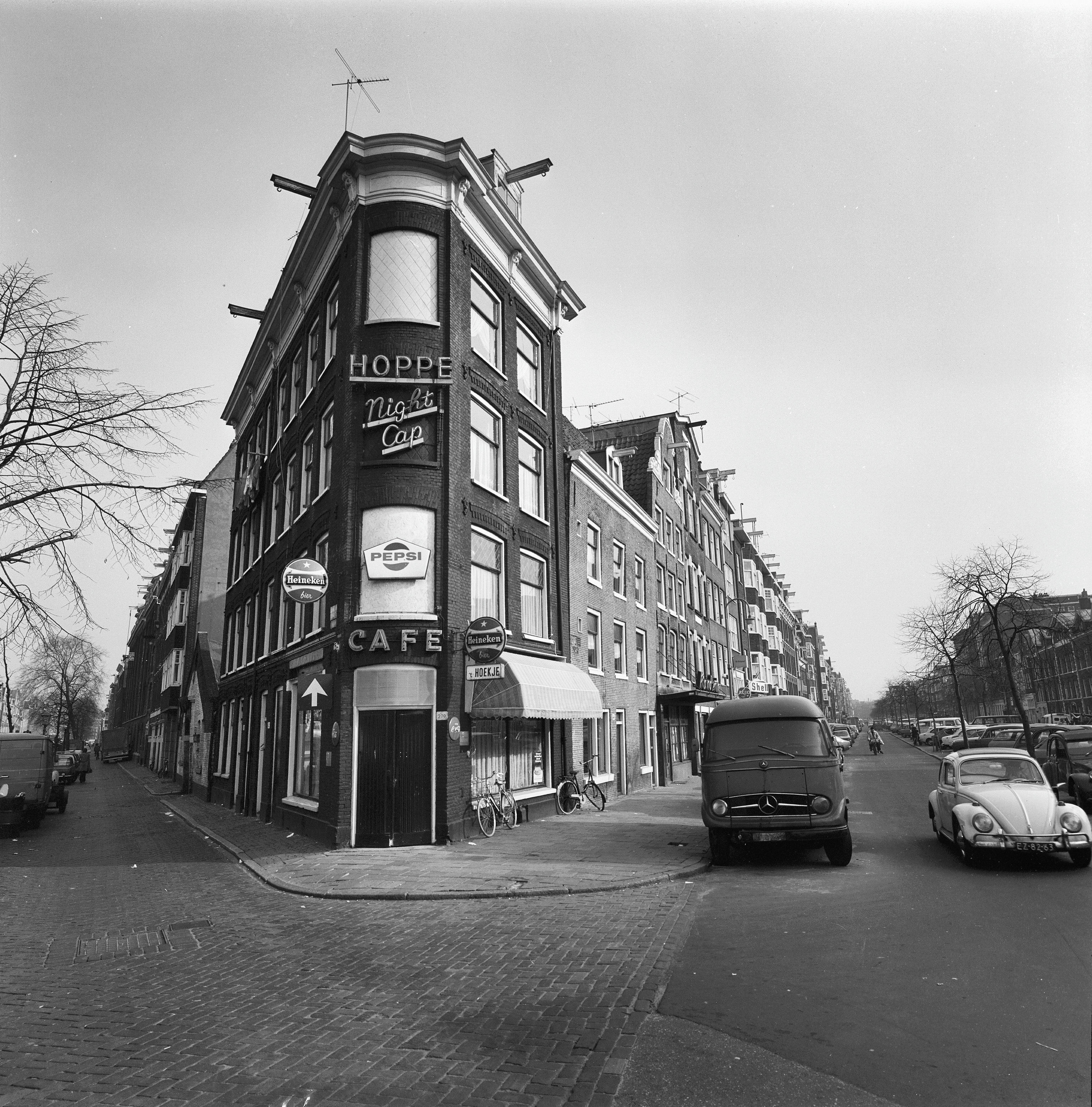 voorgevels